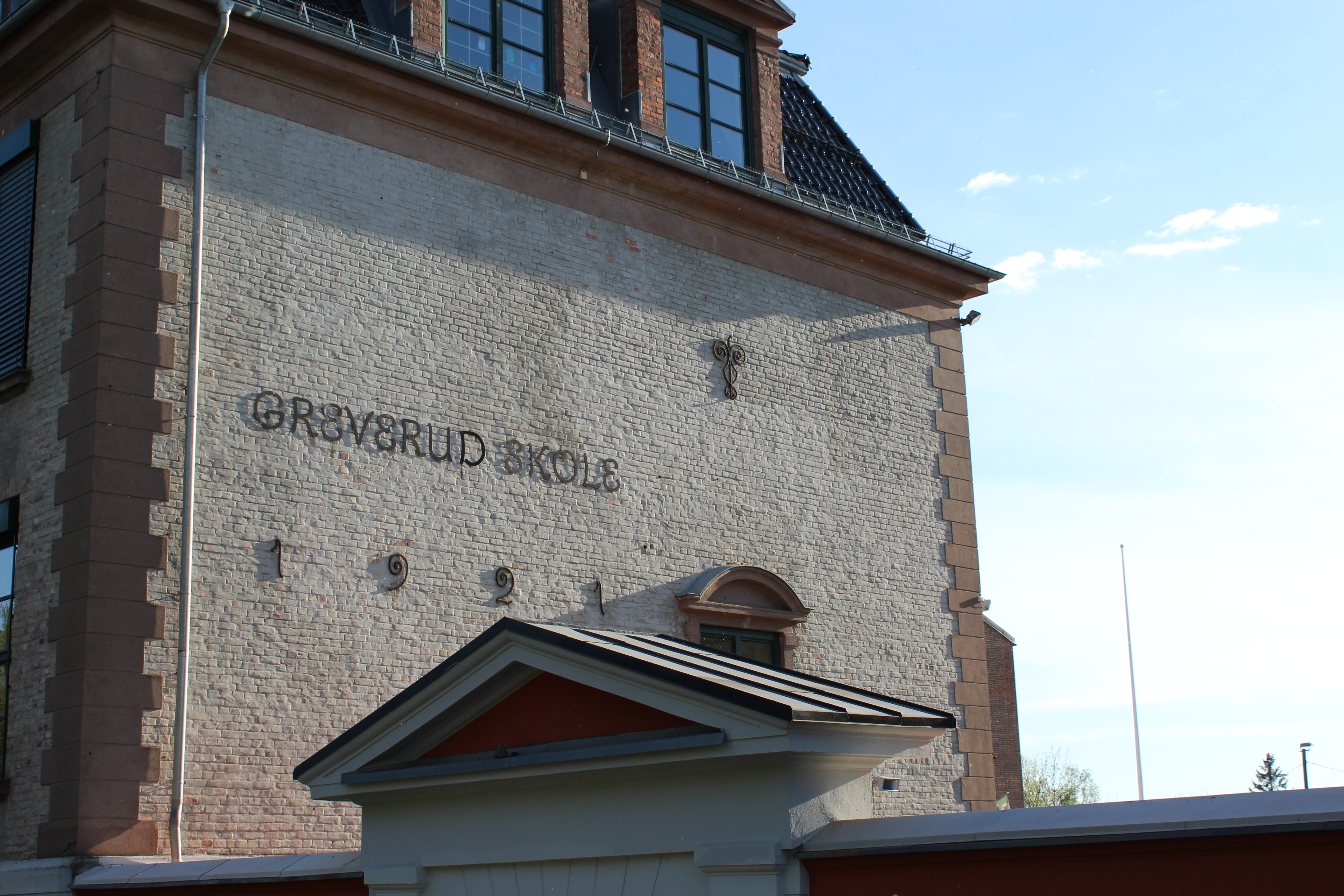 Greverud skoles 1921 skilt